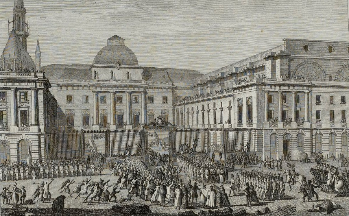 Le maire de Paris, Bailly, se rendant au Palais, poser les scellés sur les papiers du Parlement, 1790, Musée de la Révolution française - Vizille